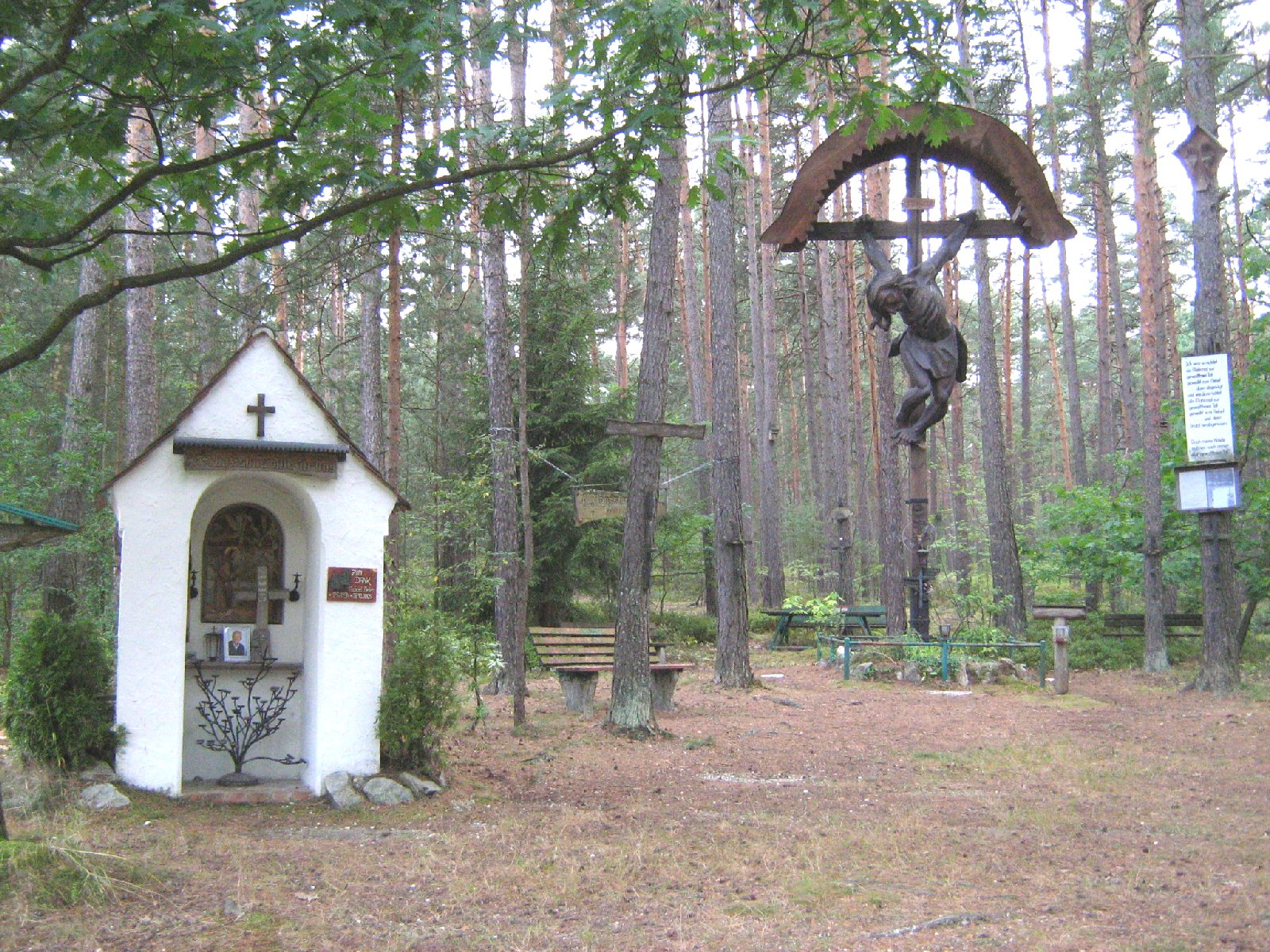 Franziskus-Marterl (Anti-WAA-Wackersdorf-Kapellenbildstock) mit dem „Kreuz von Wackersdorf“ in Altenschwand (Bodenwöhr). Marterl-Inschriften: Holztafel: Hl. Franziskus bitte für uns Tontafel: Zum Dank - Michael Meier - *12.6.1934 †26.10.2005 Tontafel: WAA-Opfer 1986: Alois Sonnleitner, Johann Hirschinger, Erna Sielka, Willi Gleikner Tontafel: Die Atomstrahlung bewirkt die Abtreibung der Schöpfung und es ist ein tödlicher Witz, an die Unfehlbarkeit des Menschen zu glauben.